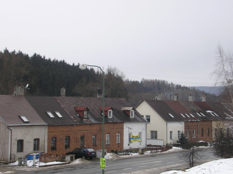 Nejstarší zástavba z dob založení BOPA v Třebíči Borovině